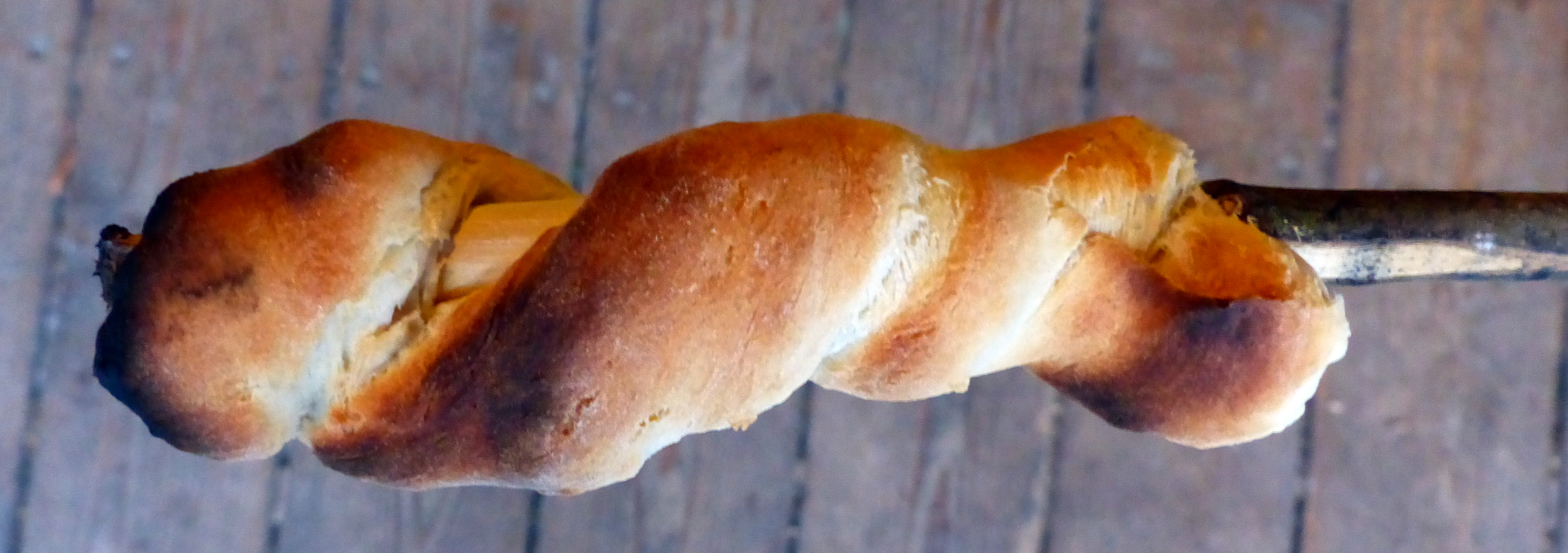 Knüppelbrot (Stockbrot), Kleines Vorwerk in Sayda, Sachsen